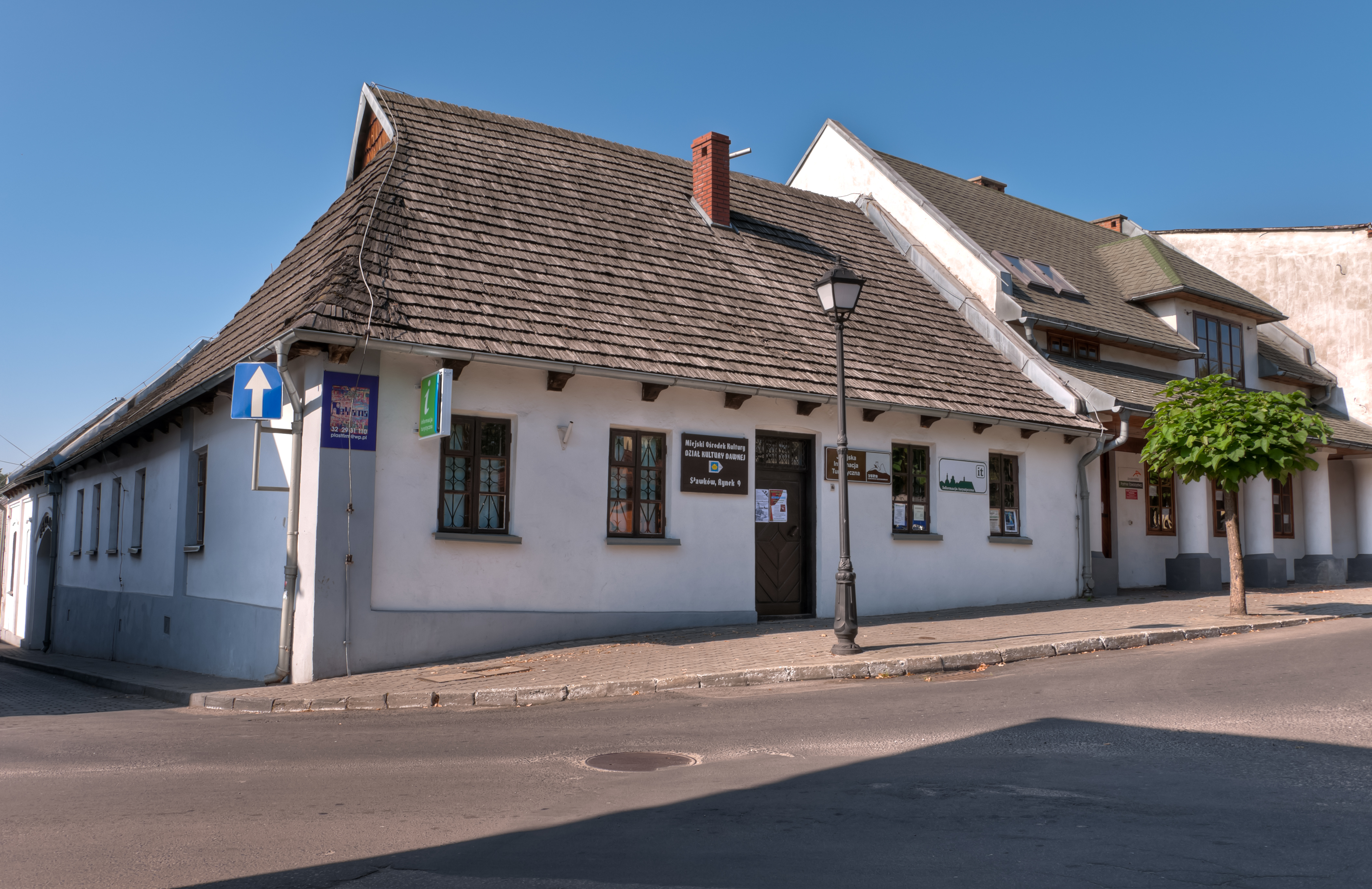 Sławków, Rynek 9 - budynek mieszkalny murowany, wybudowany na przełomie XVIII i XIX wieku, rozbudowany w 1870 r. i w 1910 r, Miejski Ośrodek Kultury i Jurajska Informacja Turystyczna (zabytek nr A-1265 z dnia 23.09.1981)